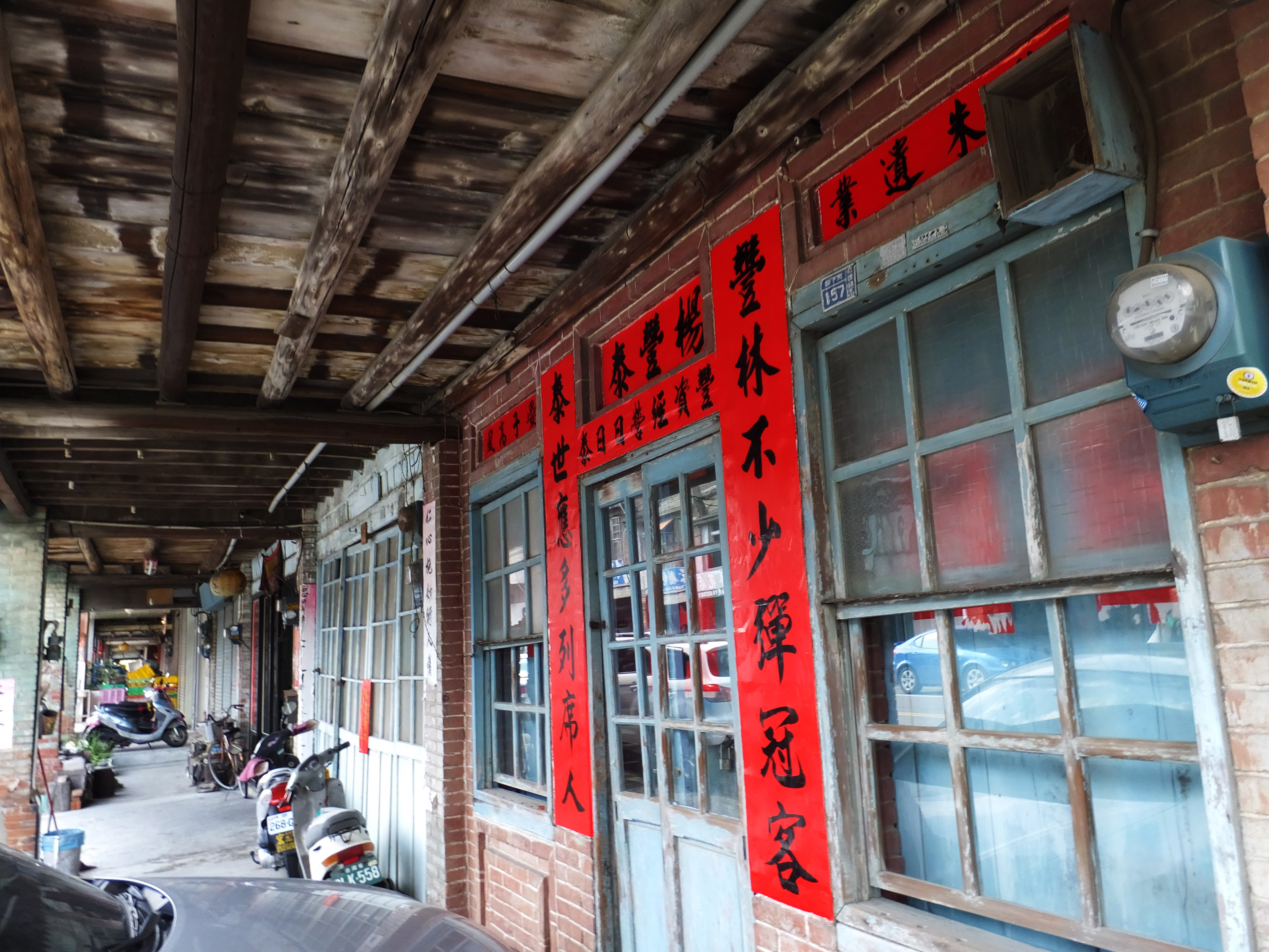 苑裡天下路 Yuanli Tianxia Road